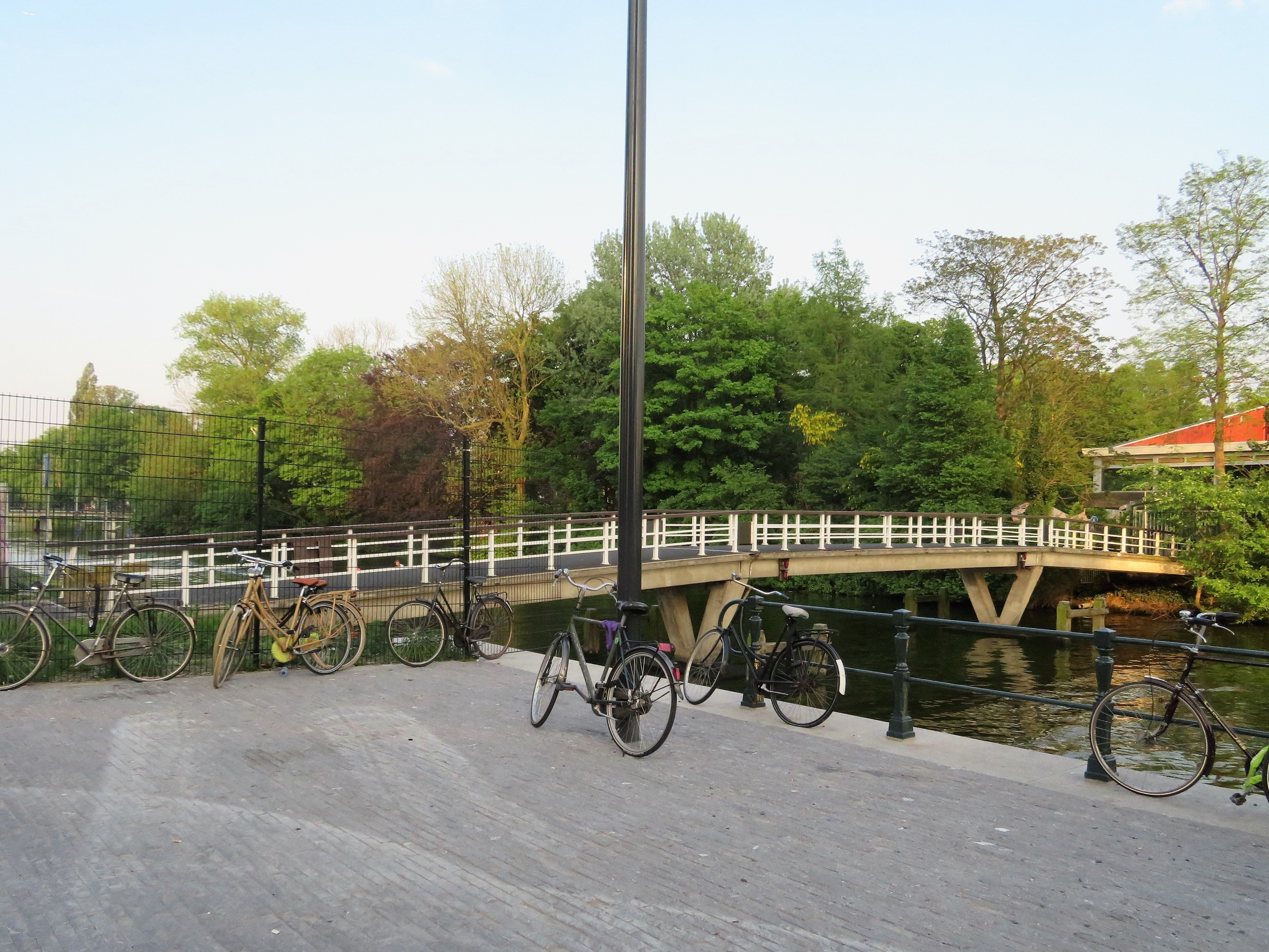 Galgenveldbrug over het Buiksloterkanaal in Amsterdam-Noord. Brugnummer 2476